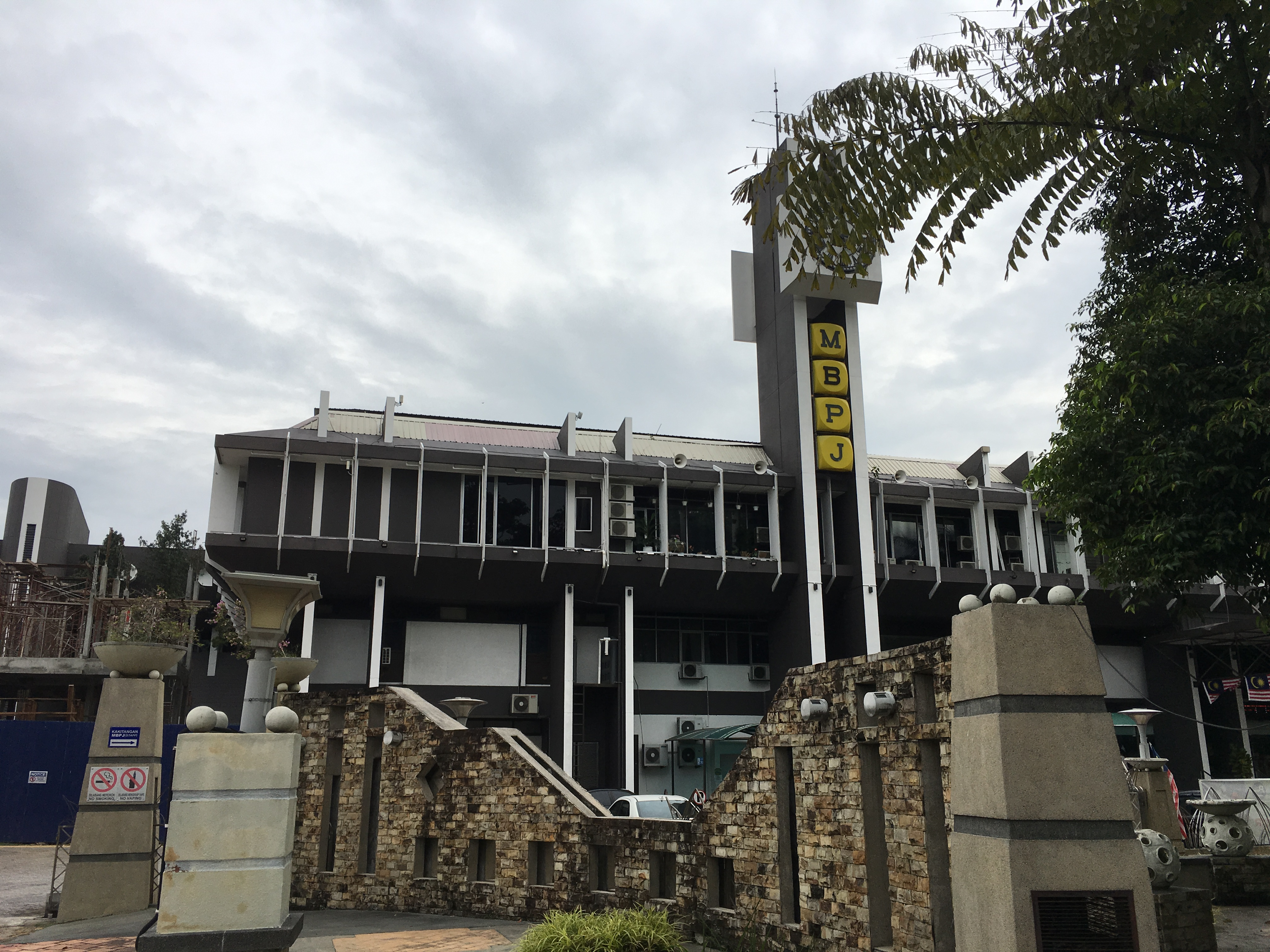 Bangunan ibupejabat MBPJ 2018